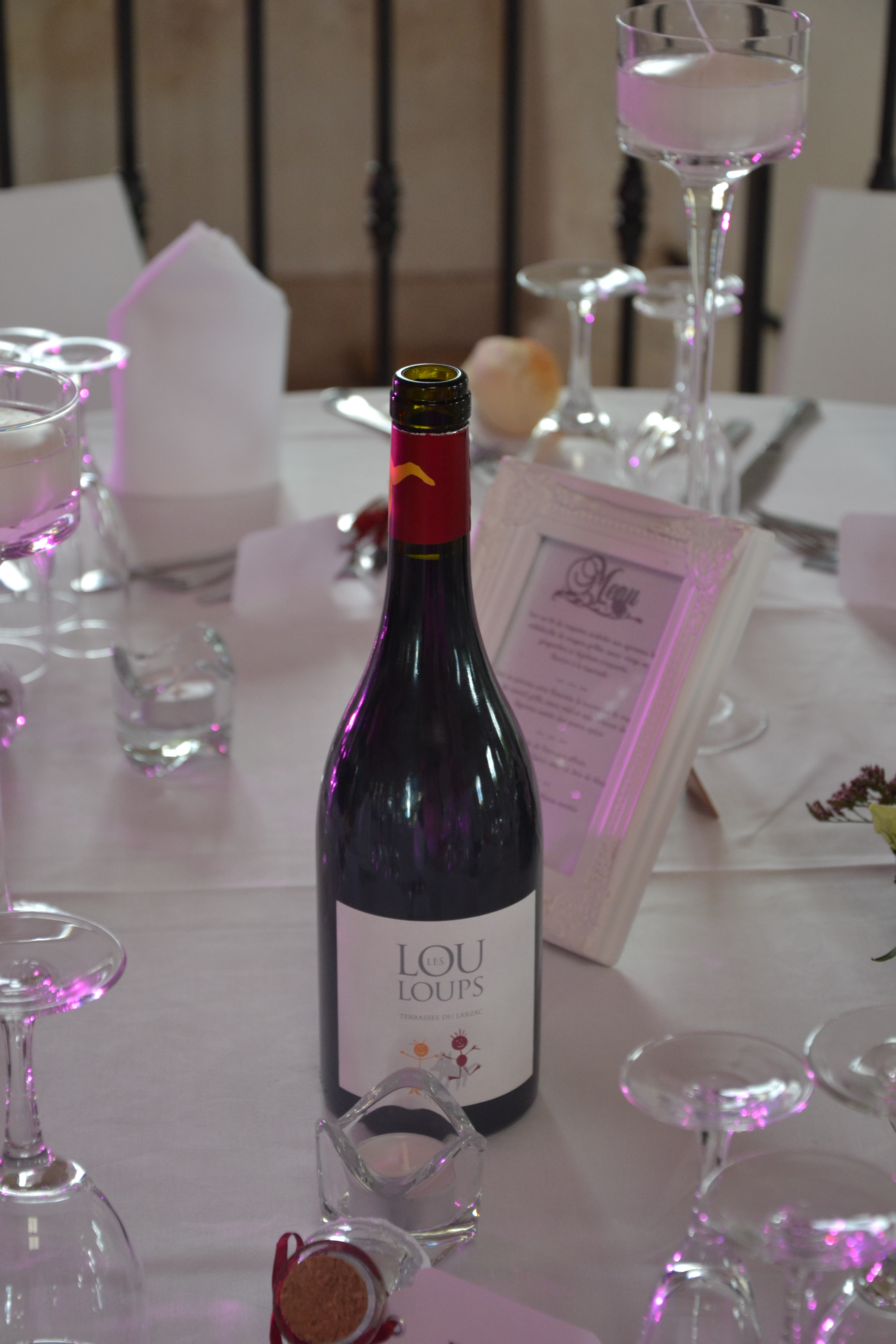 Bouteille de Terrasses du Larzac